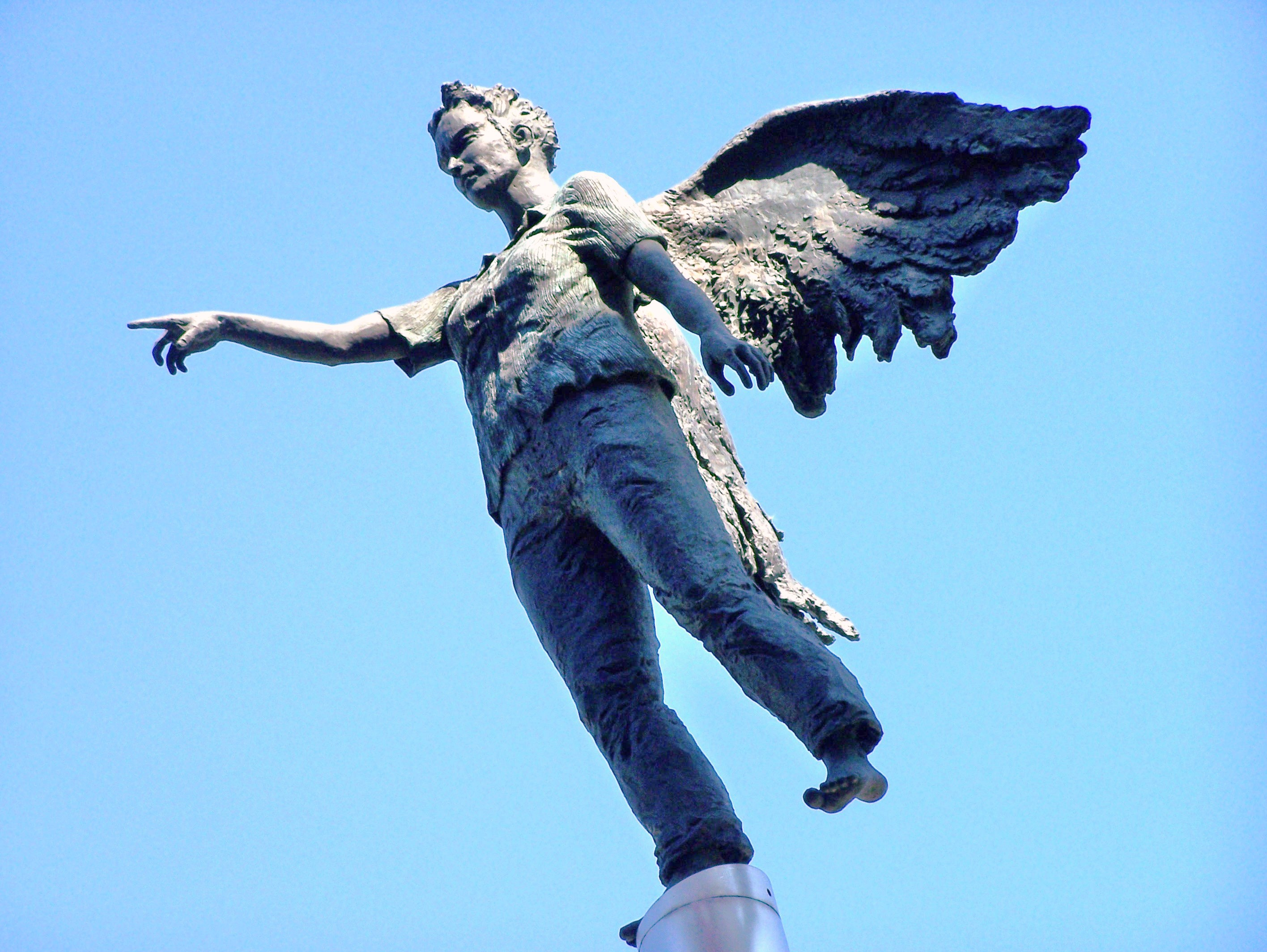 Die hoch über dem Stadtzentrum von Chemnitz balancierende Skulptur "Engel" stammt von der Künstlerin Silke Rehberg (1997)